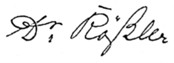 Unterschrift des deutschen Schriftstellers Robert Rößler